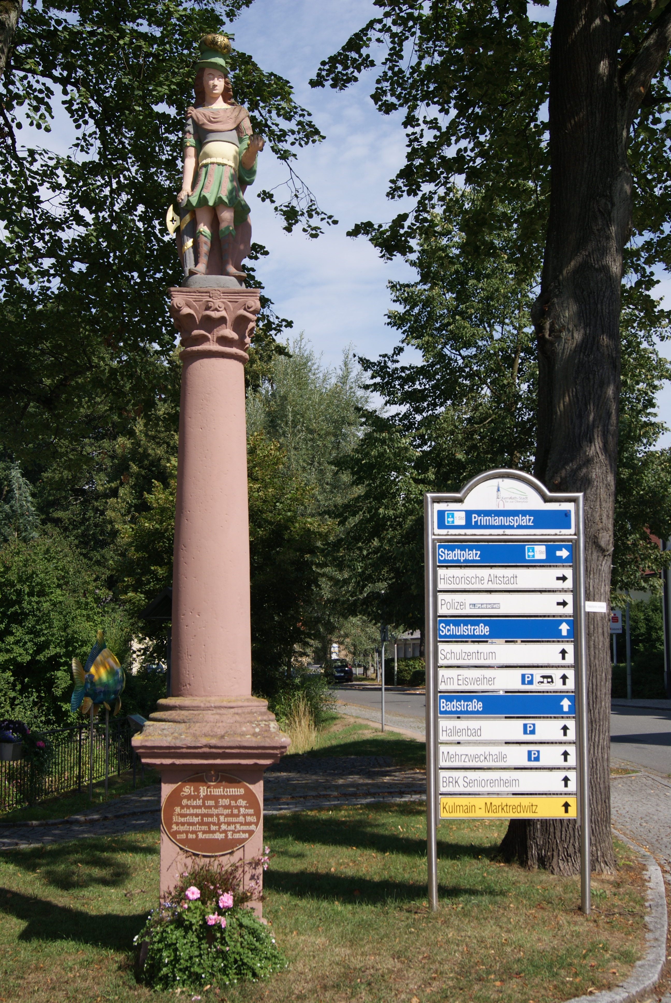 Bildstock. Mit Figur des heiligen Primianus, bezeichnet 1695.This is a photograph of an architectural monument.